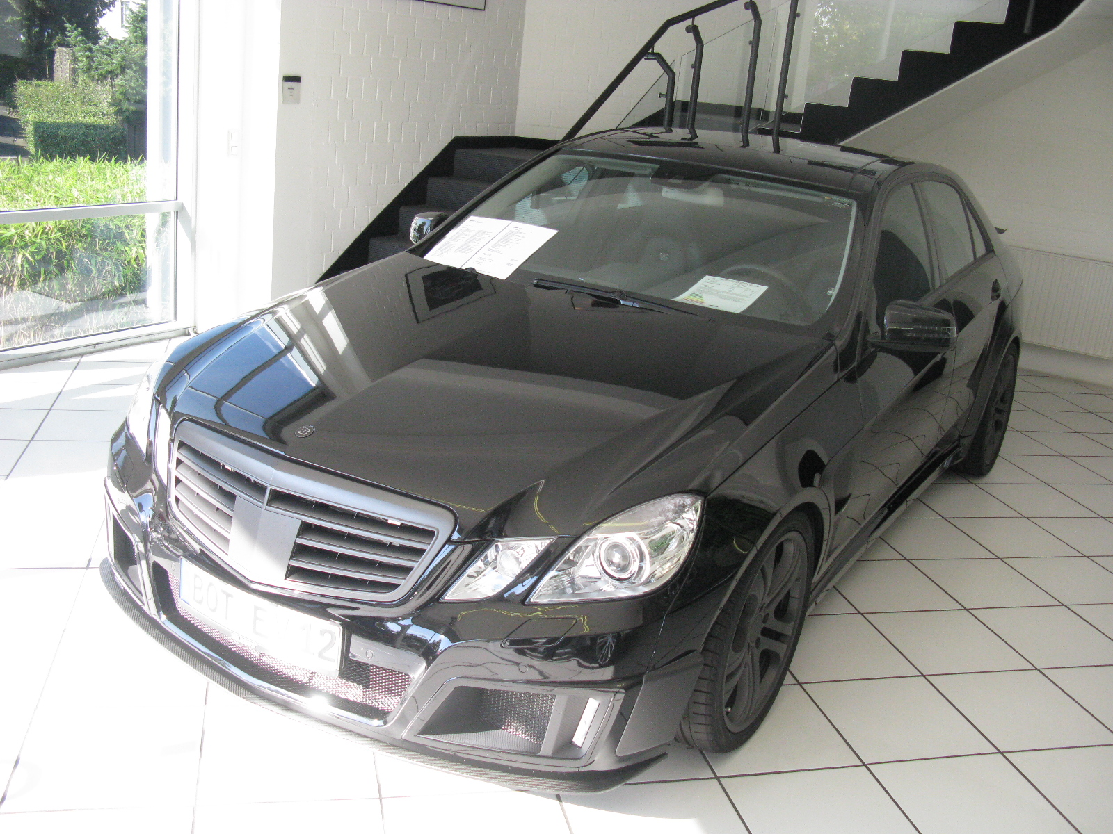 Mercedes-benz EV12 Brabus W212